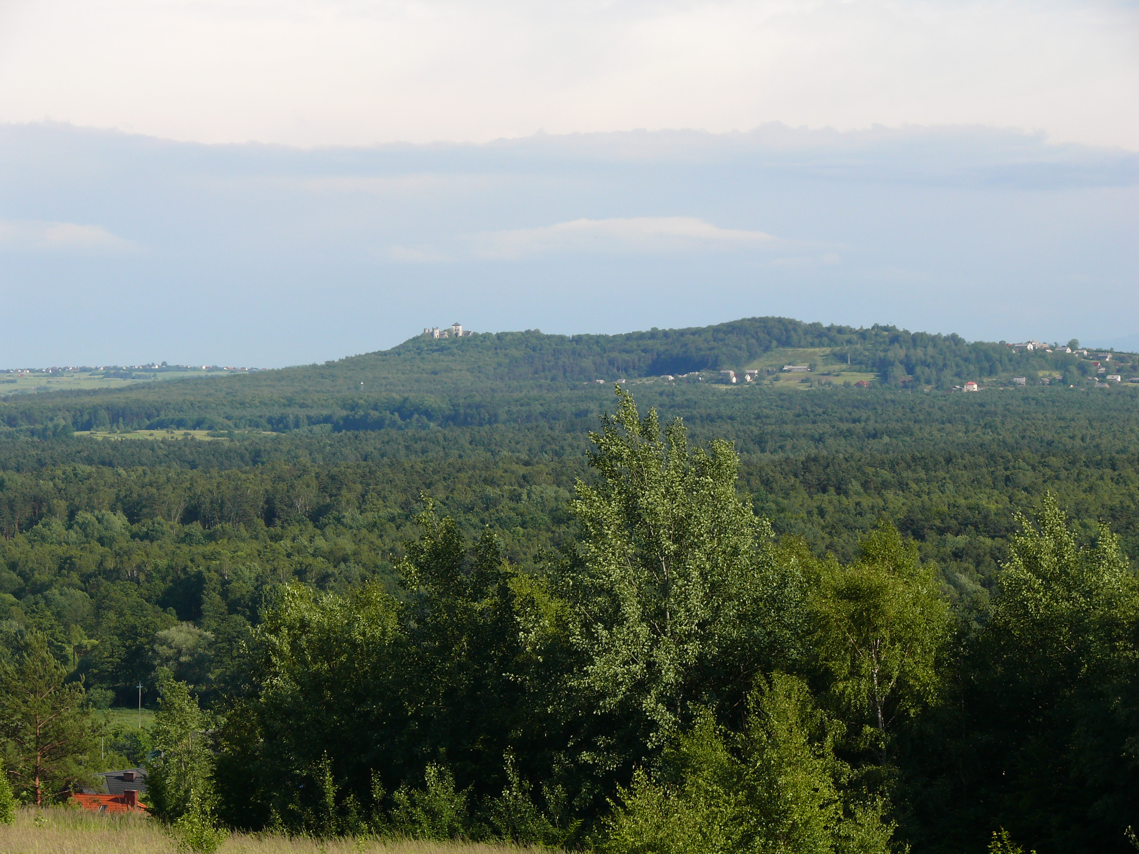 Widok na Puszczę Dulowską i Zamek Tenczyn